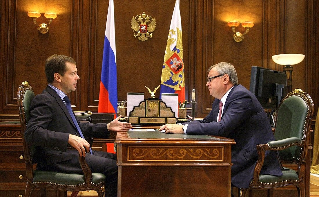 С президентом – председателем правления Банка ВТБ Андреем Костиным. 8 октября 2009 года